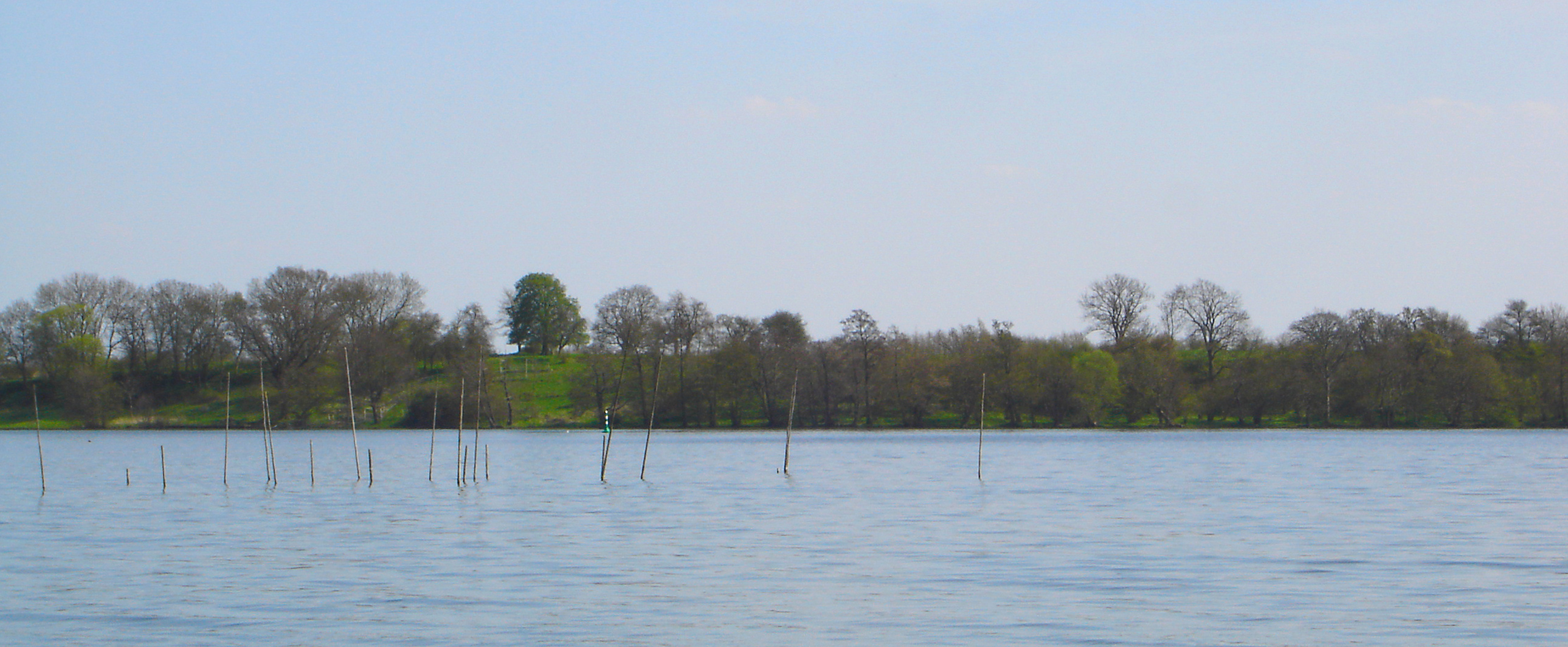 Insel Lieps im Schweriner See / Isle Lieps in the Schweriner See